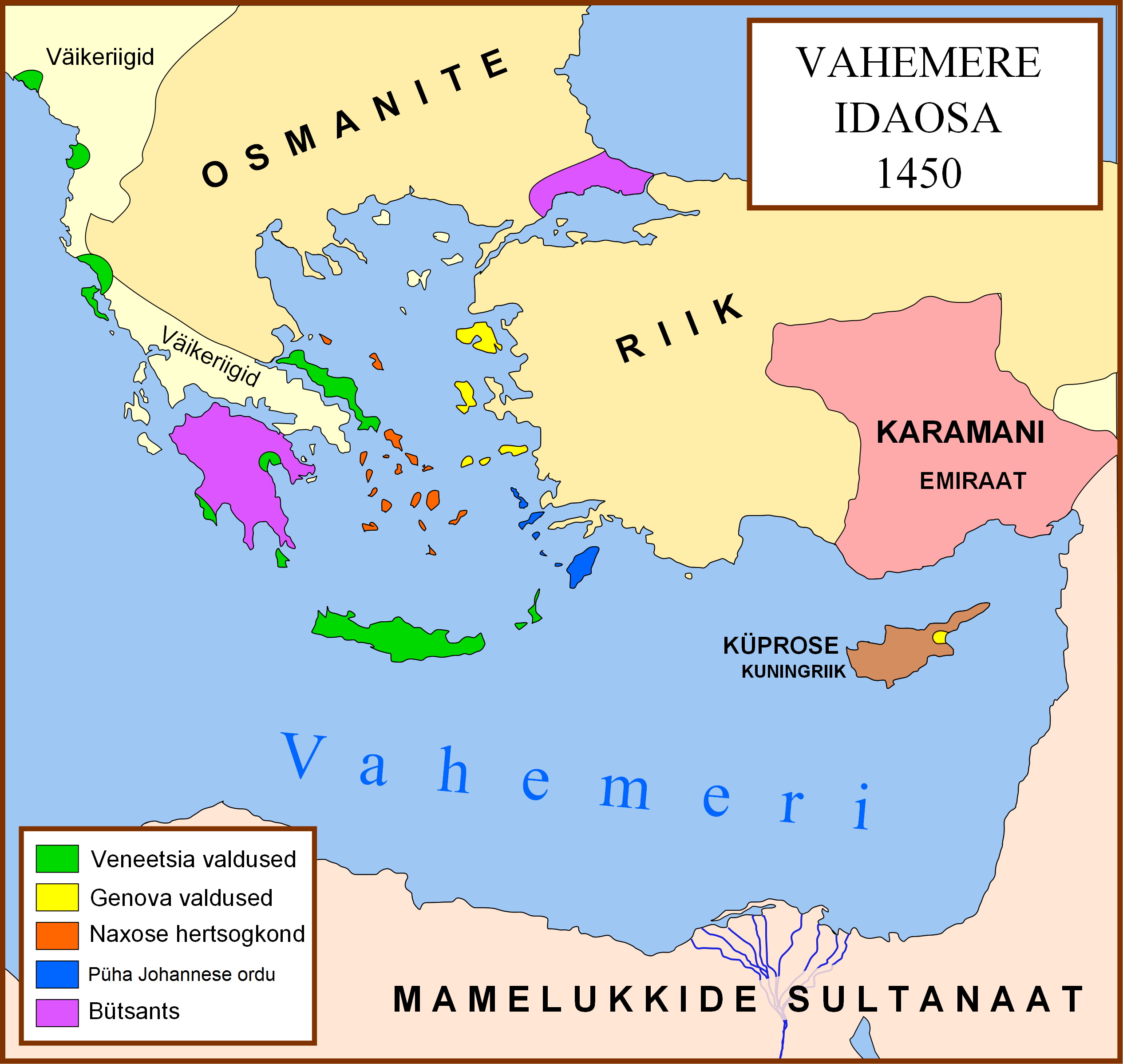 Bütsants (1450)